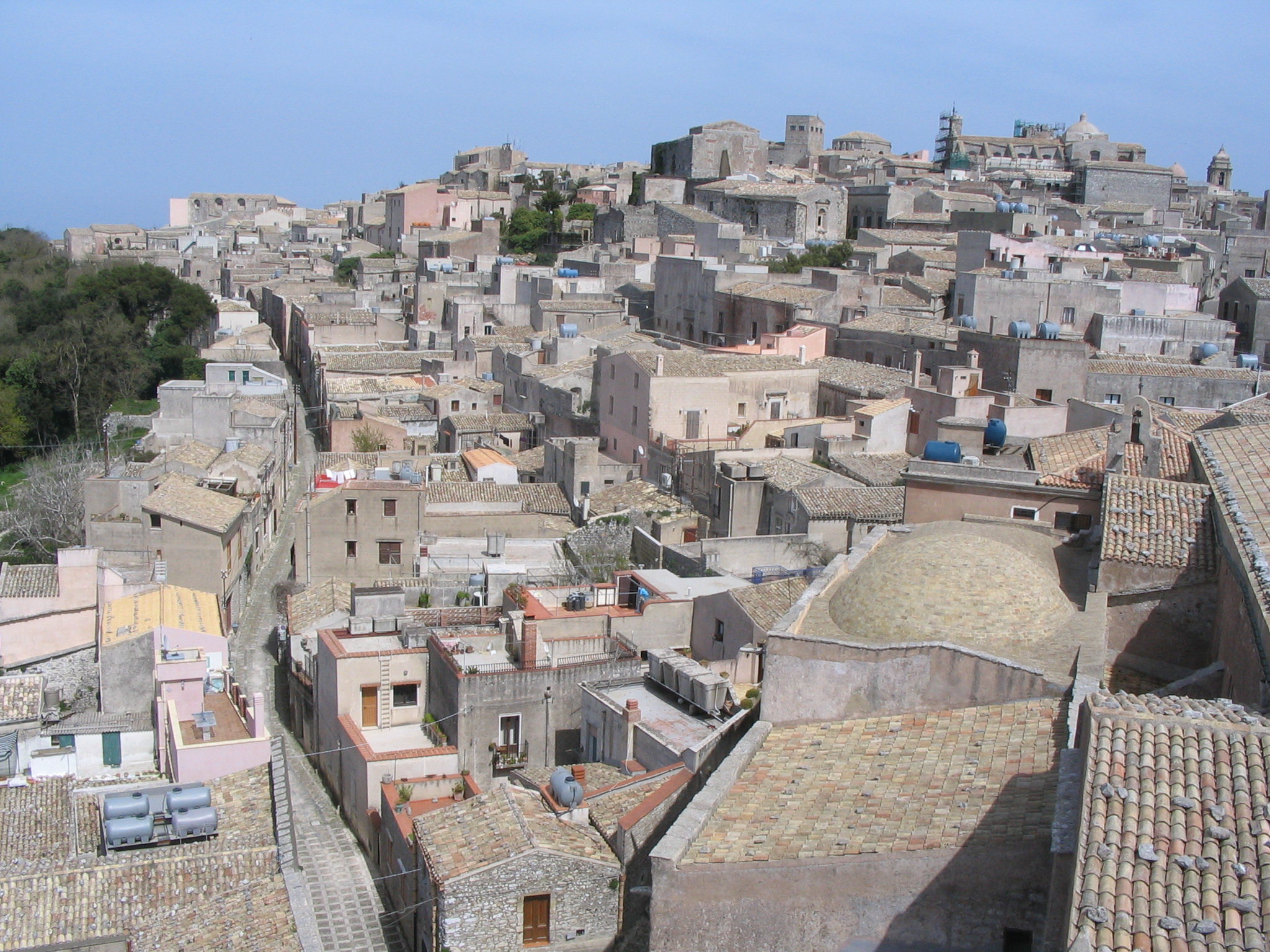 Erice - vue depuis le sommet de la cathedrale - Via Rabata